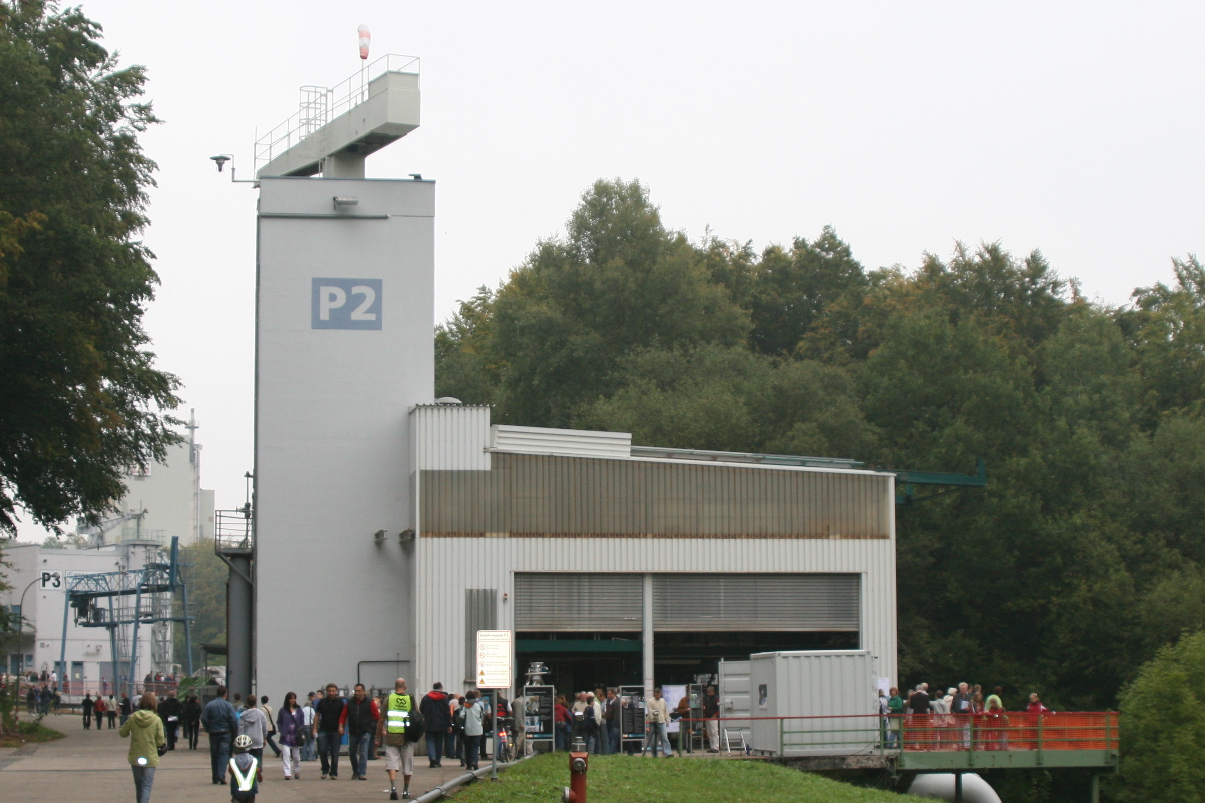 Prüfstand P2 am DLR-Standort Lampoldshausen